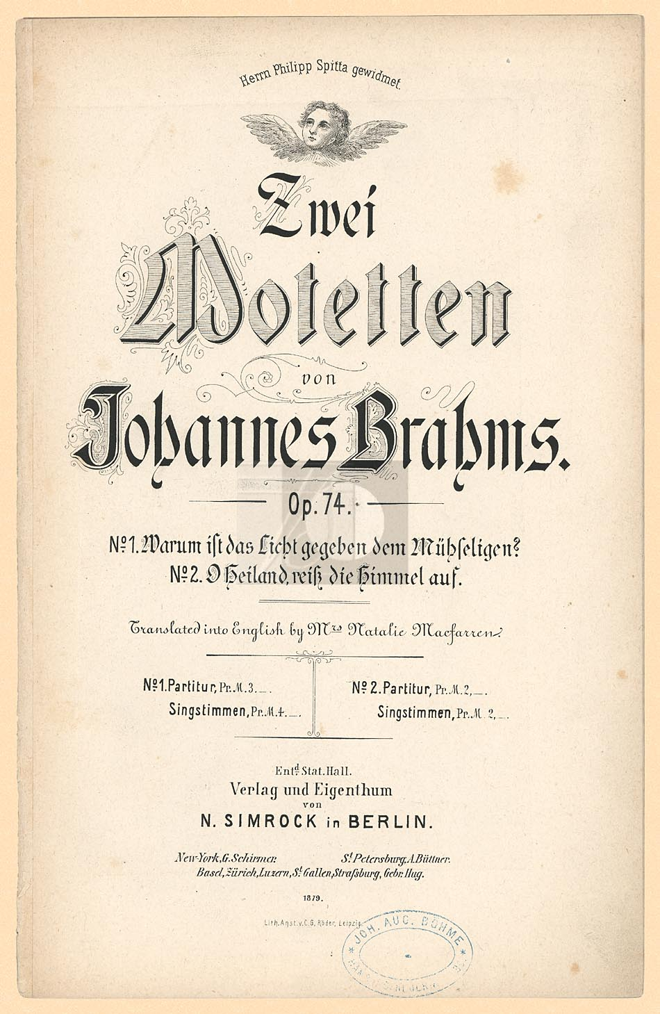 Zwei Motetten op. 74 de Johannes Brahms, édition originale de 1879